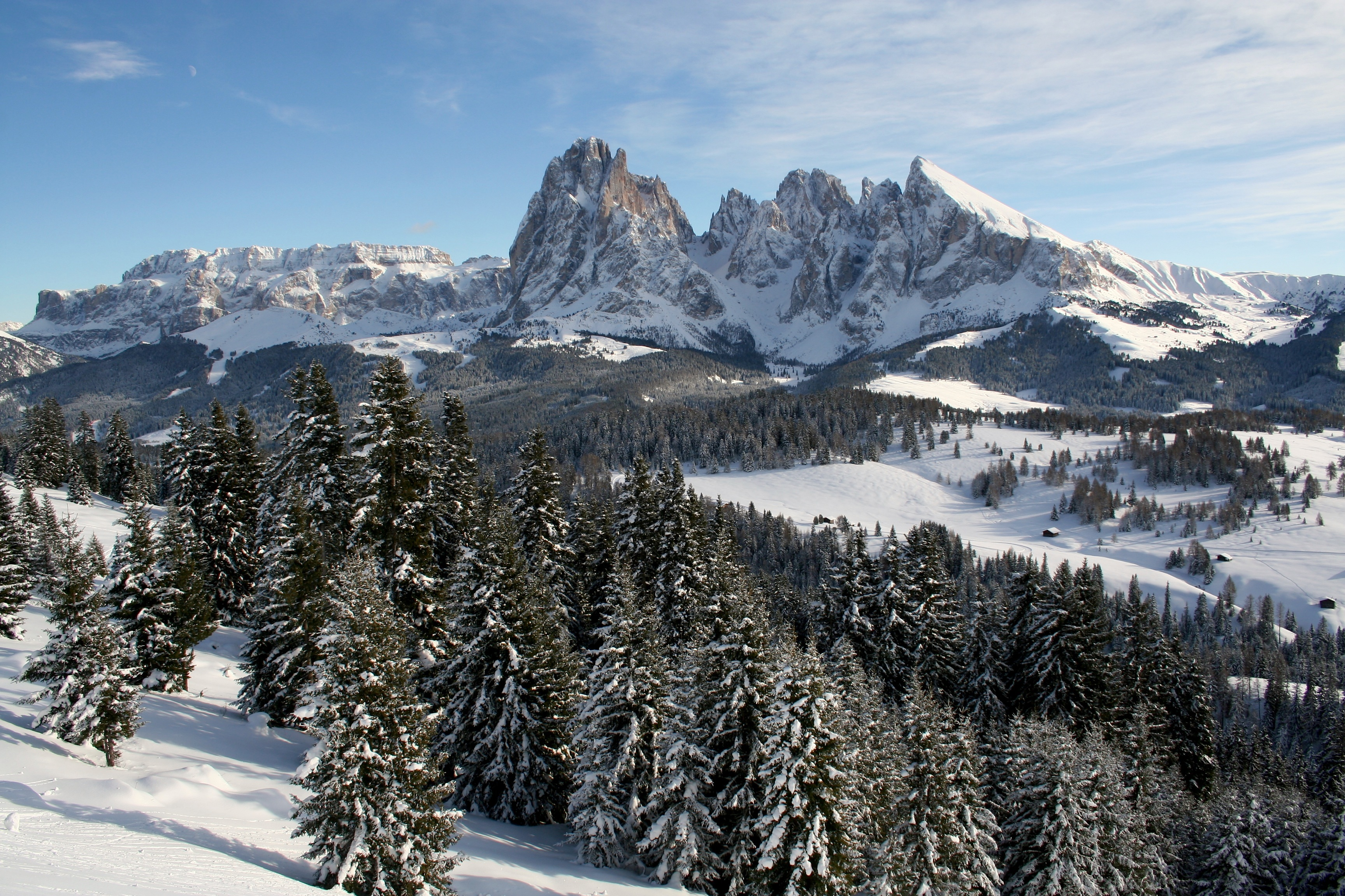 Seiser Alm und Langkofelgruppe vom Pizberg aus gesehen